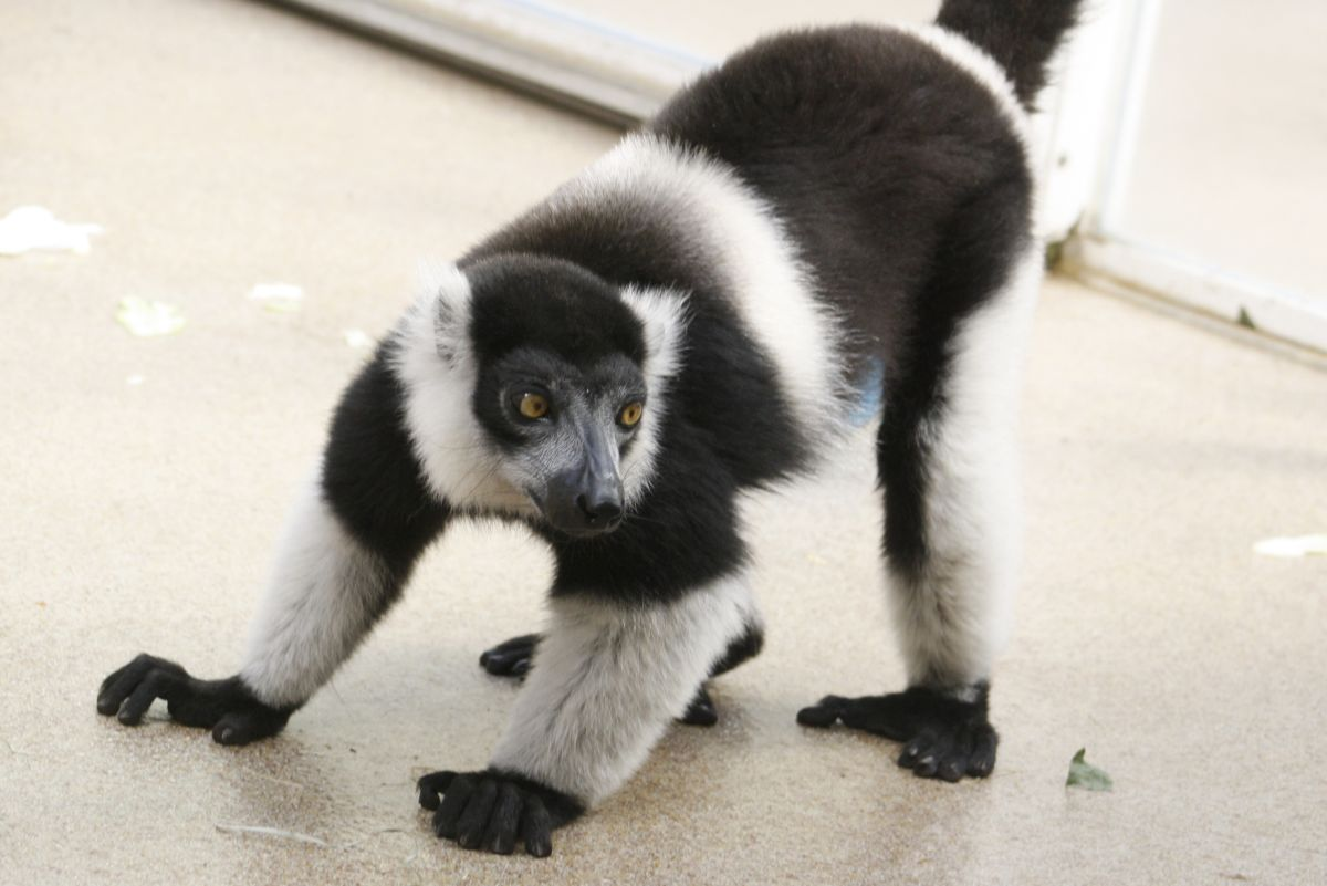 Gordelvari (Varecia variegata subcincta) in de Berliner Zoo